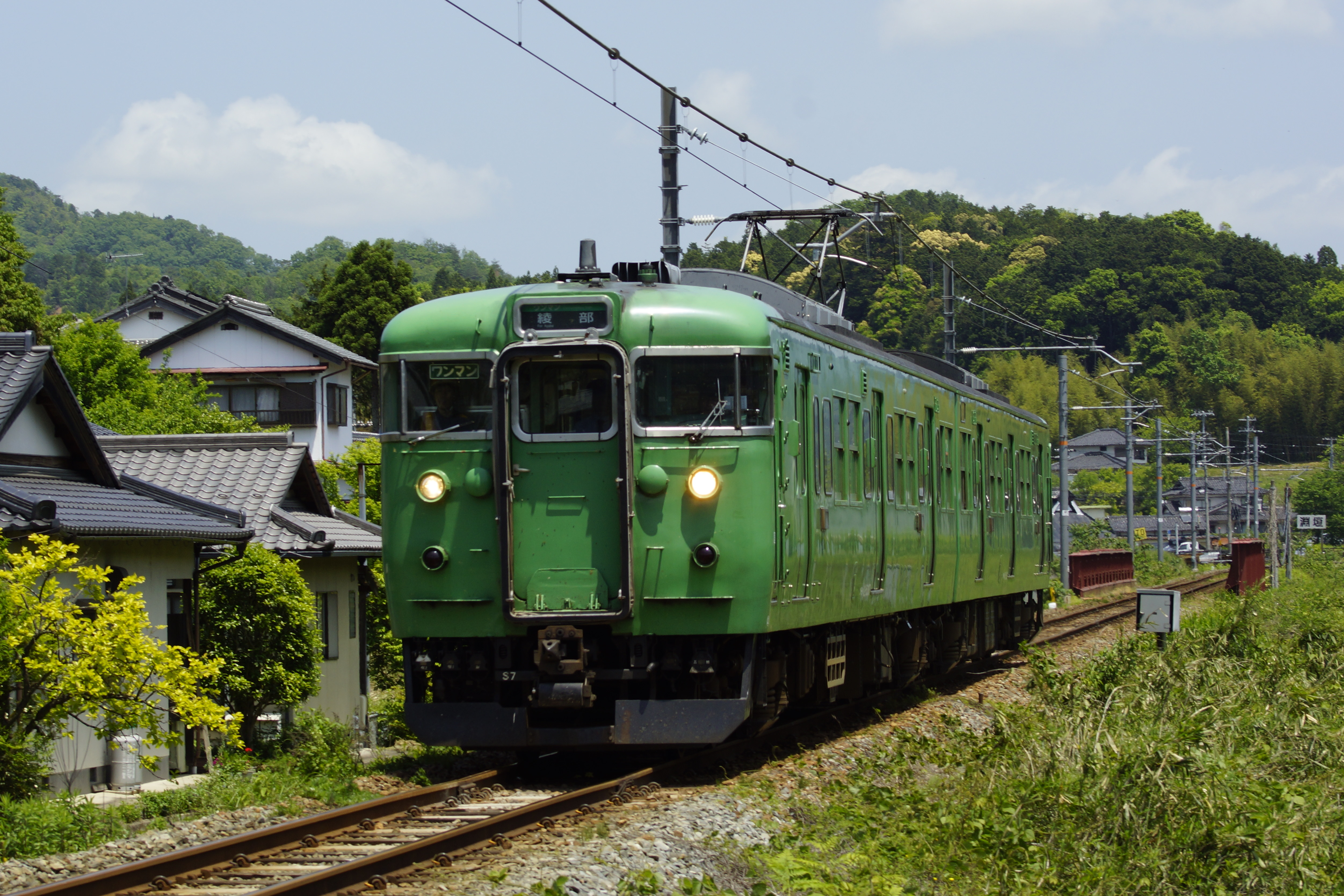 舞鶴線 綾部～淵垣間を走行中の113系